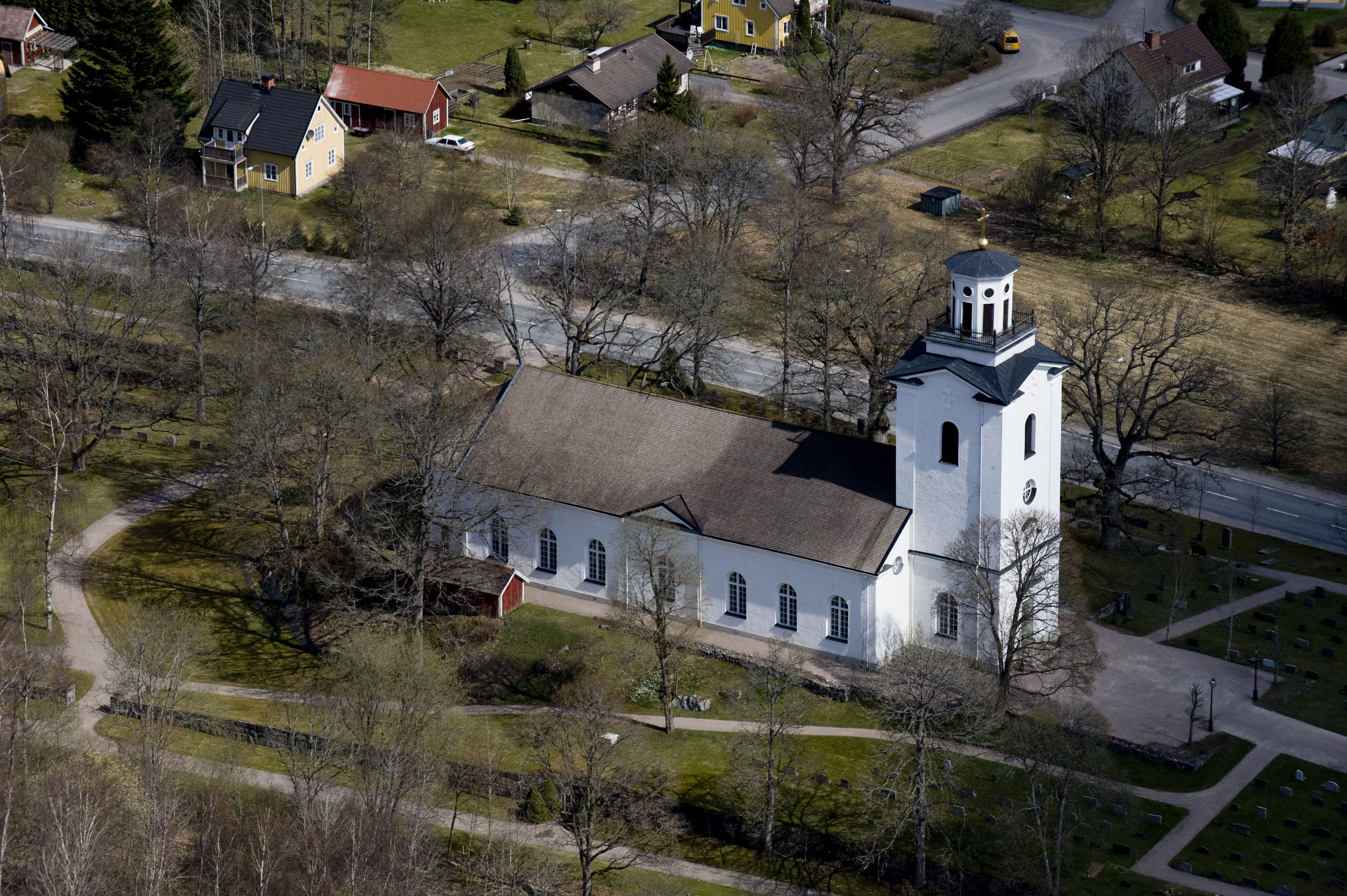 Korsberga kyrka. Riksväg 31 går förbi.